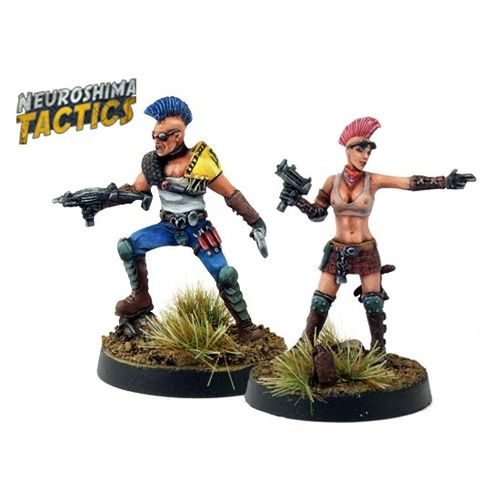 zdjęcie figurek punków do gry Neuroshima Tactics